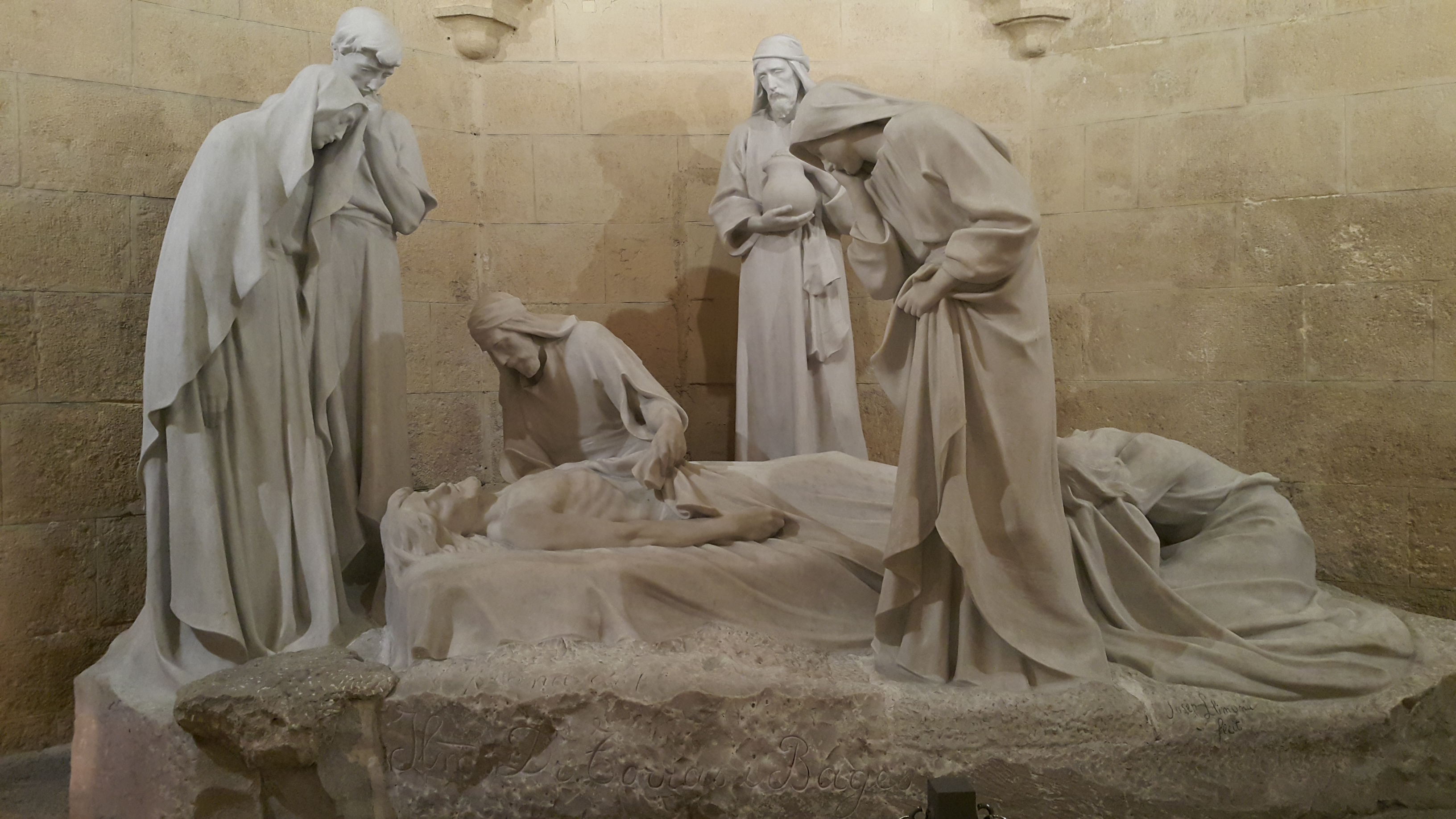 Llimona_Josep_LEnterramentDeCrist_1916_Vista Frontal